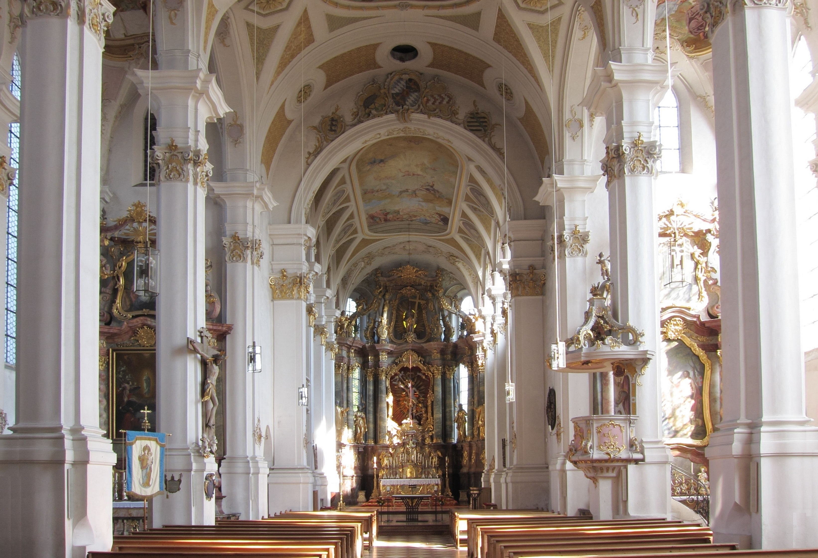 Pfarrkirche St. Sebastian, ehem. Klosterkirche, dreischiffige Halle 1481/84 durch Ulrich Randeck erbaut, Chor 1450/52, barocker Umbau 1733/34, erneuert 1785, Sebastianskapelle 1671, Turm um 1230; mit Ausstattung (D-1-75-115-10)